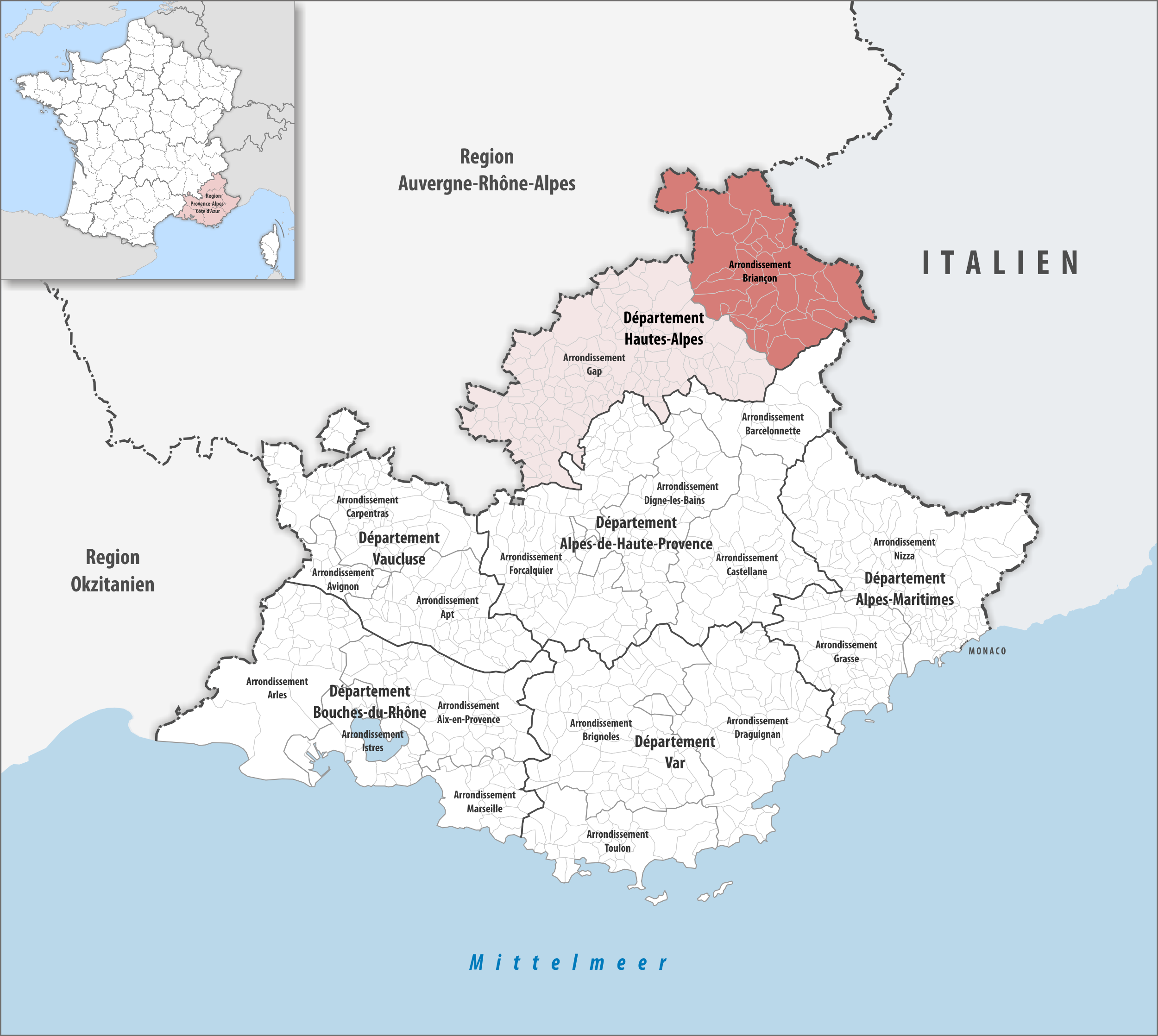 Lage des Arrondissements Briançon